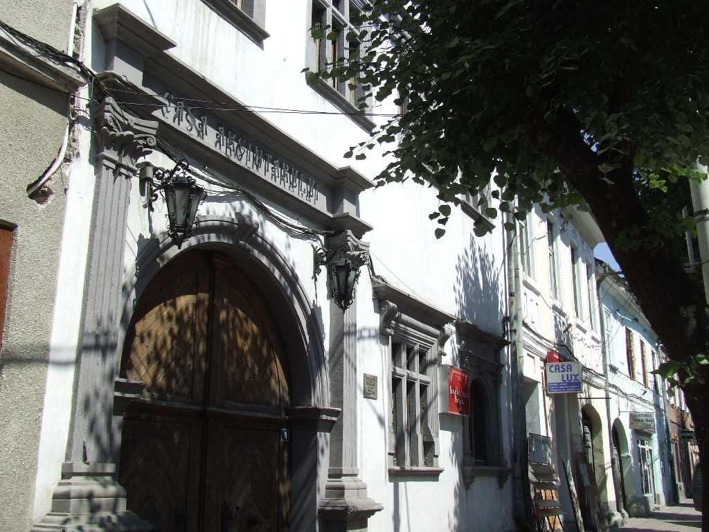 Image from Bistriţa city, Bistriţa-Năsăud County, Romania